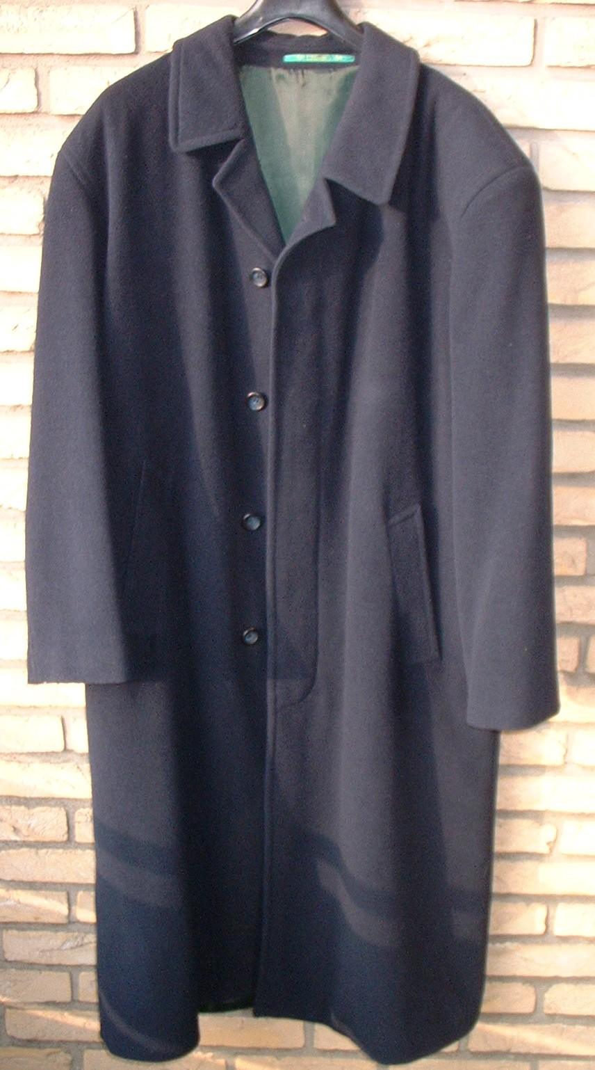 Pansky flausovy plast